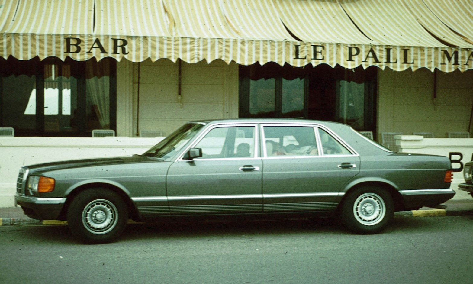 Mercedes Benz W126 '500SEL' (lwb)